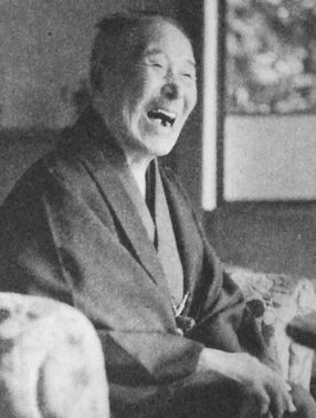 志賀潔